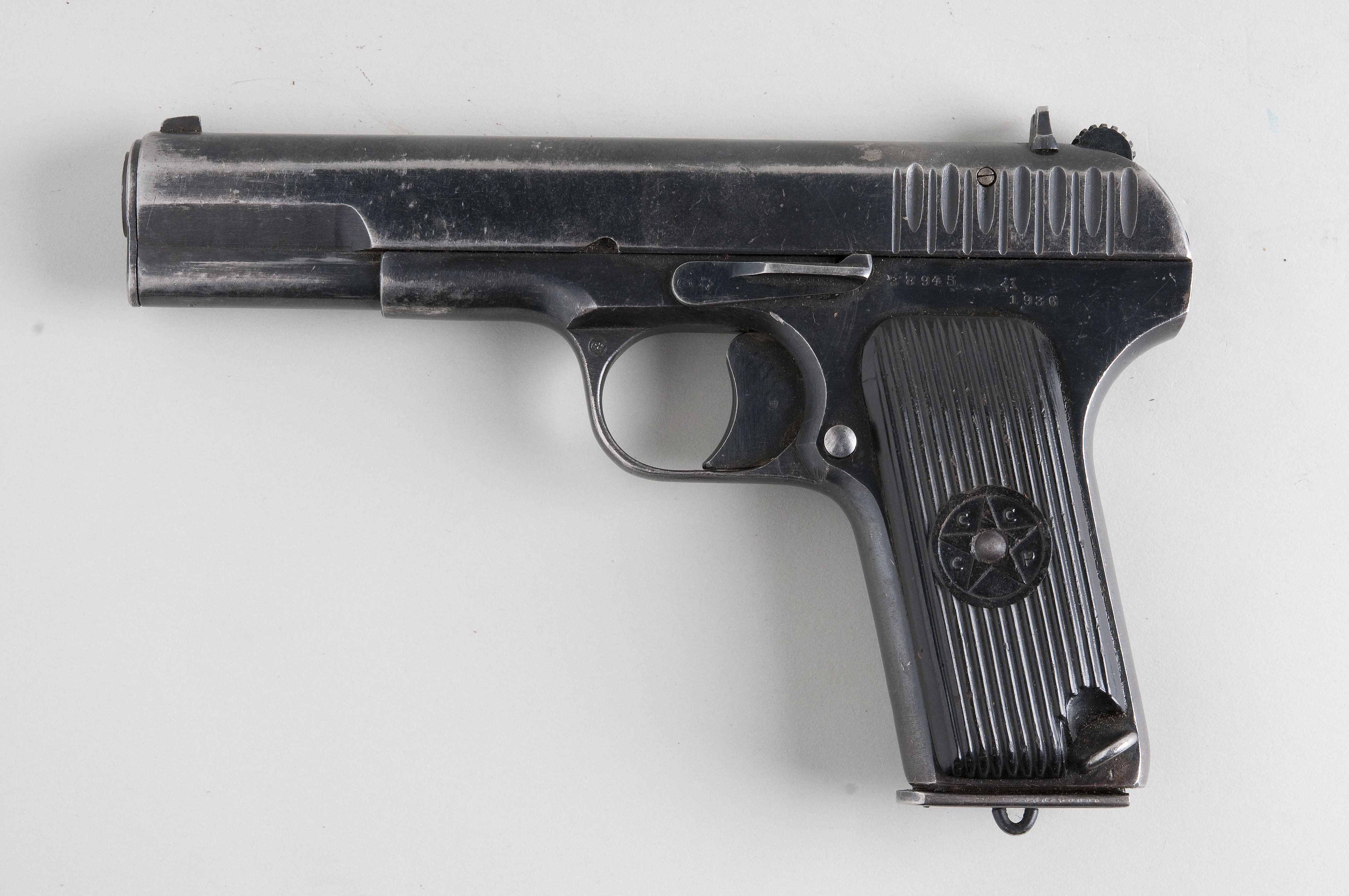 Tokarev TT33 From flickr user handvapensamlingen - Pistols used in Norway.